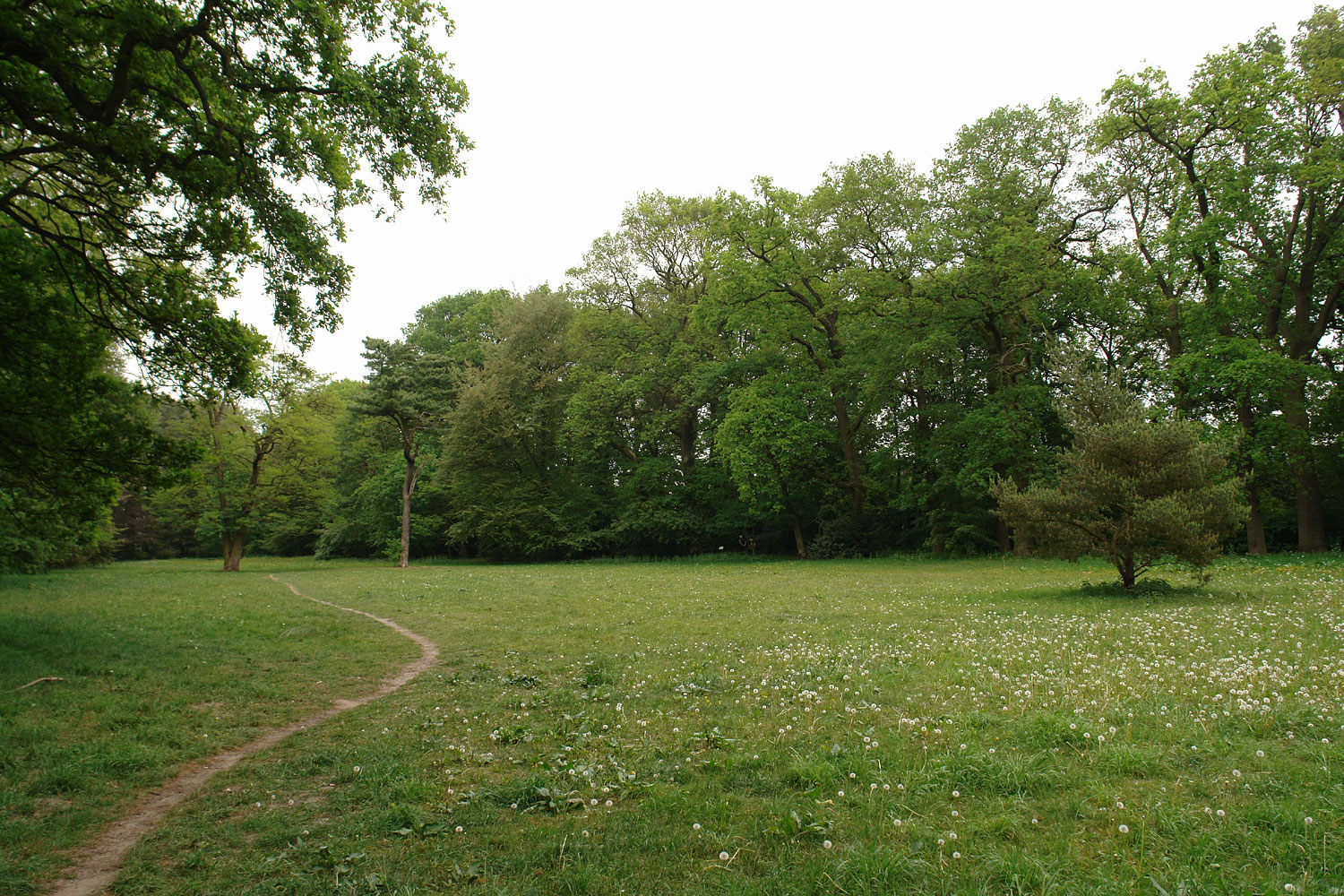 Gut Landruhe, Bremen: Menke Park aus Richtung Am Rüten Denkmaldatenbank